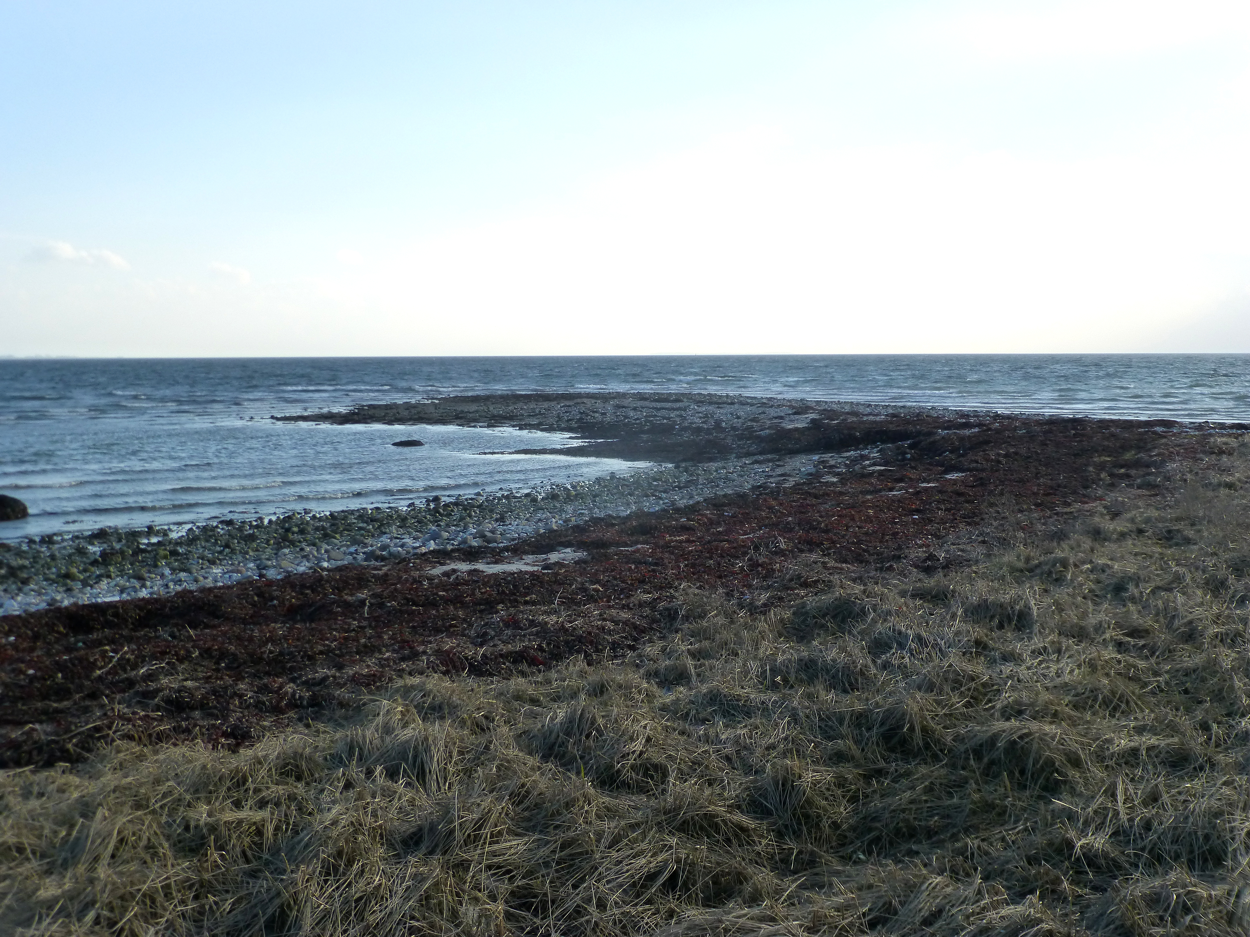 Det yderste næs